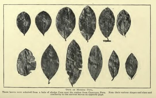 Página 251 del libro de William Golden Mortimer, The History of Coca: The Divine Plant of the Incas (1901).